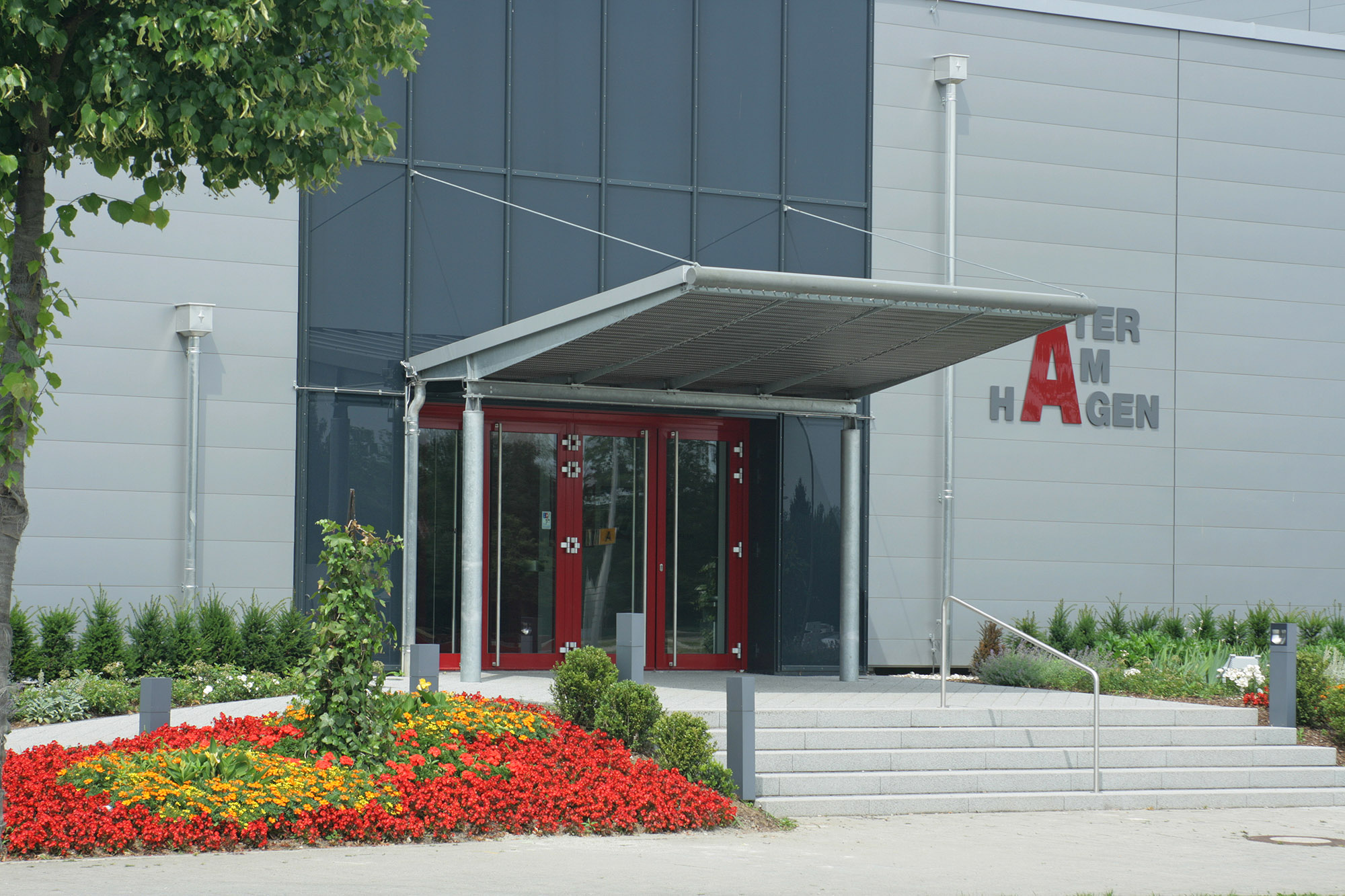 Außenansicht des Stadttheaters Am Hagen in Straubing